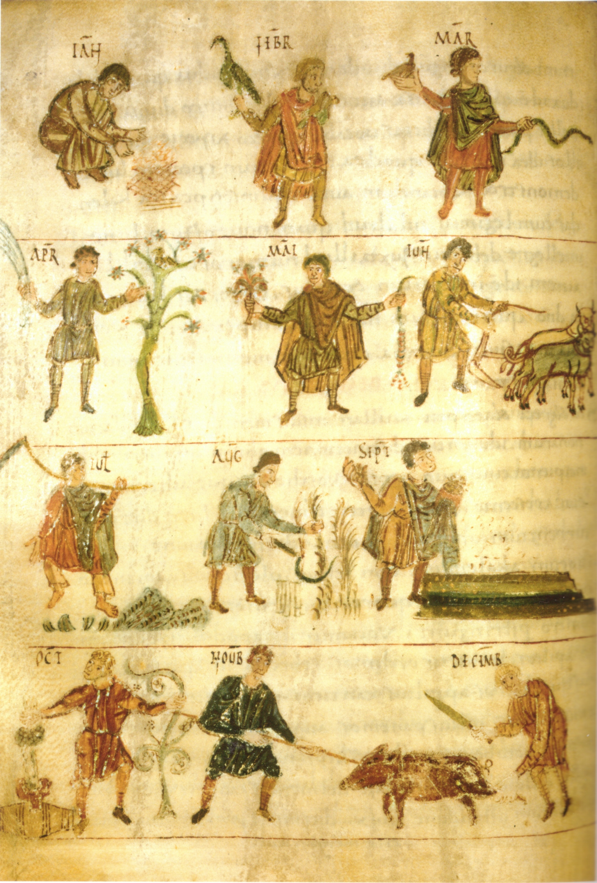 Wien, ÖNB, Cod. 387, 90v, Salzburg, 1. Viertel d. 9. Jahrhunderts, Kalenderbild